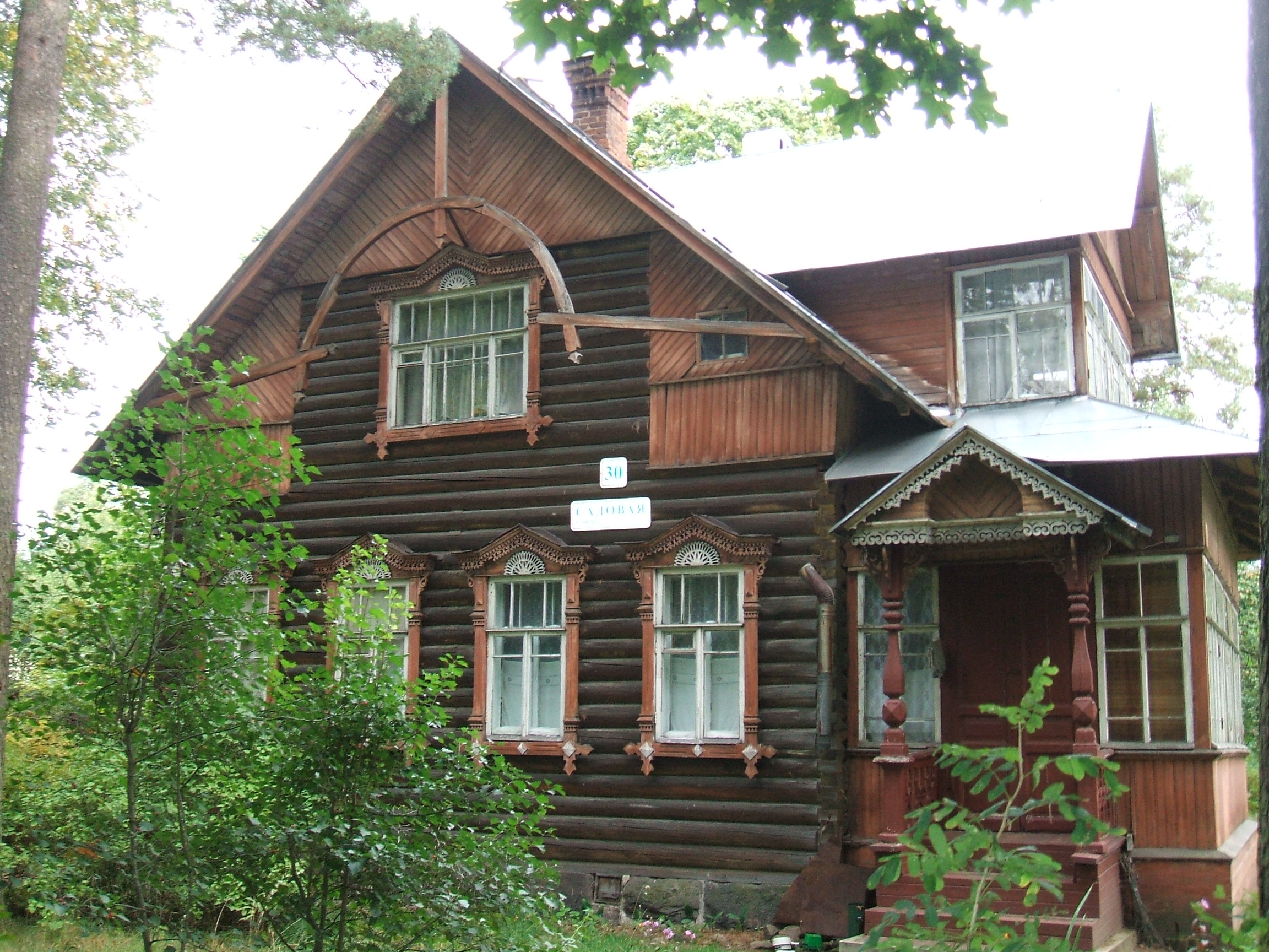 п.Песочный Курортного СПб Здание кружевной деревянной архитектуры до 1917 года